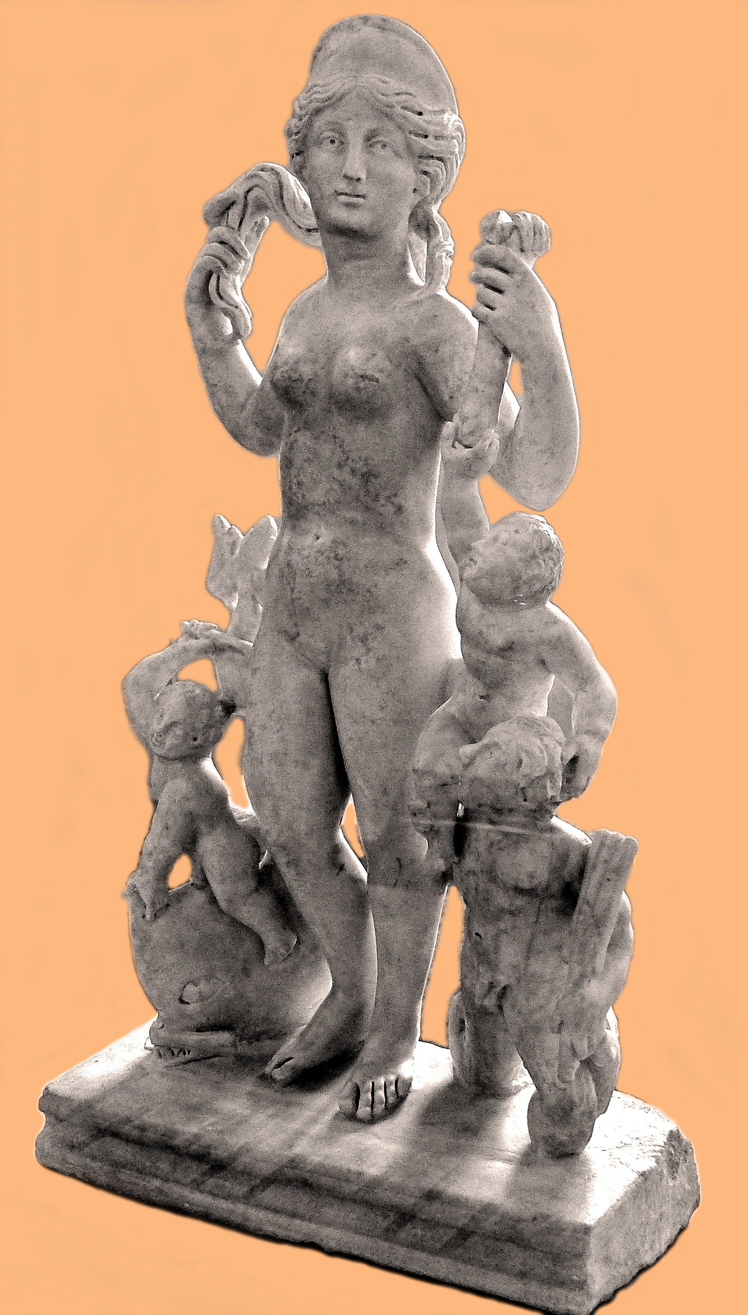 Vénus Anadyomène (dite aussi de Montagne).